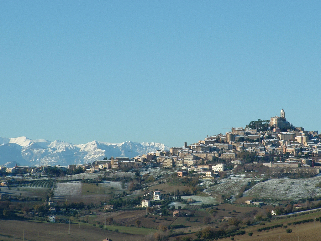 Fermo-vista da nord est (contrada S. Petronilla)